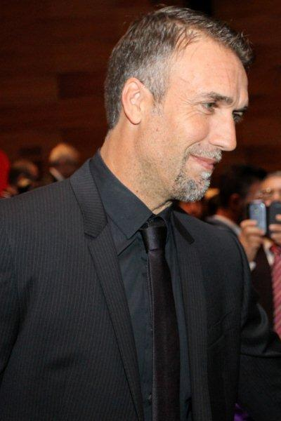 Gabriel Omar Batistuta (Avellaneda, 1º febbraio 1969) è un dirigente sportivo, allenatore di calcio ed ex calciatore argentino, di ruolo attaccante. (from it.wp)